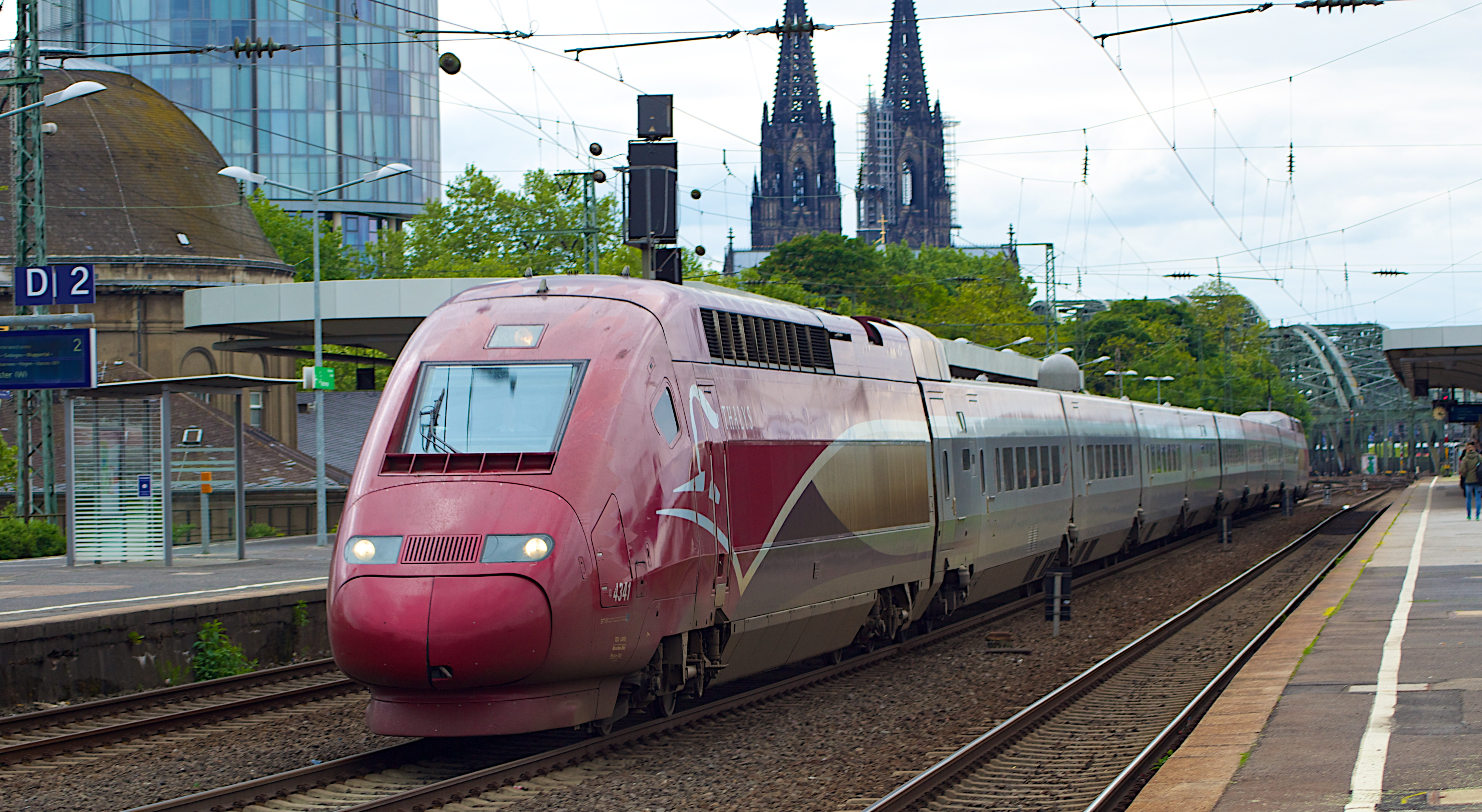 Thalys von Paris Nord nach Essen Hbf in Köln Messe/Deutz